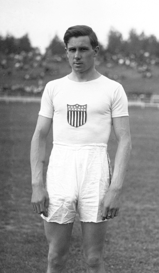 23-7-12, Reims, Egon Erikson, américain, gagnant du saut en hauteur avec élan [portrait] : [photographie de presse] / [Agence Rol]